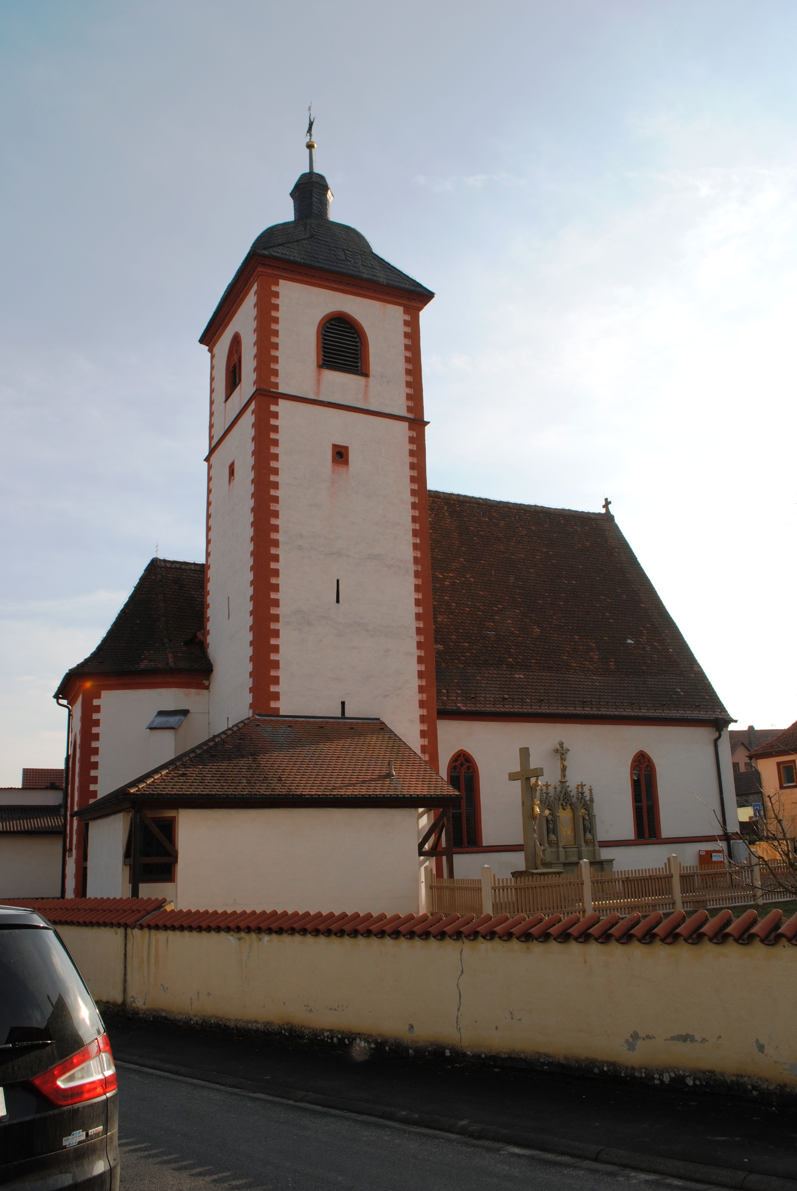 Pfarrkirche Astheim, Volkach, spätgotische Anlage, 2. H. 15. Jahrhundert, Langhaus 1775 verändert